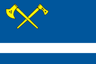 Prapor obce Valašská Bystřice